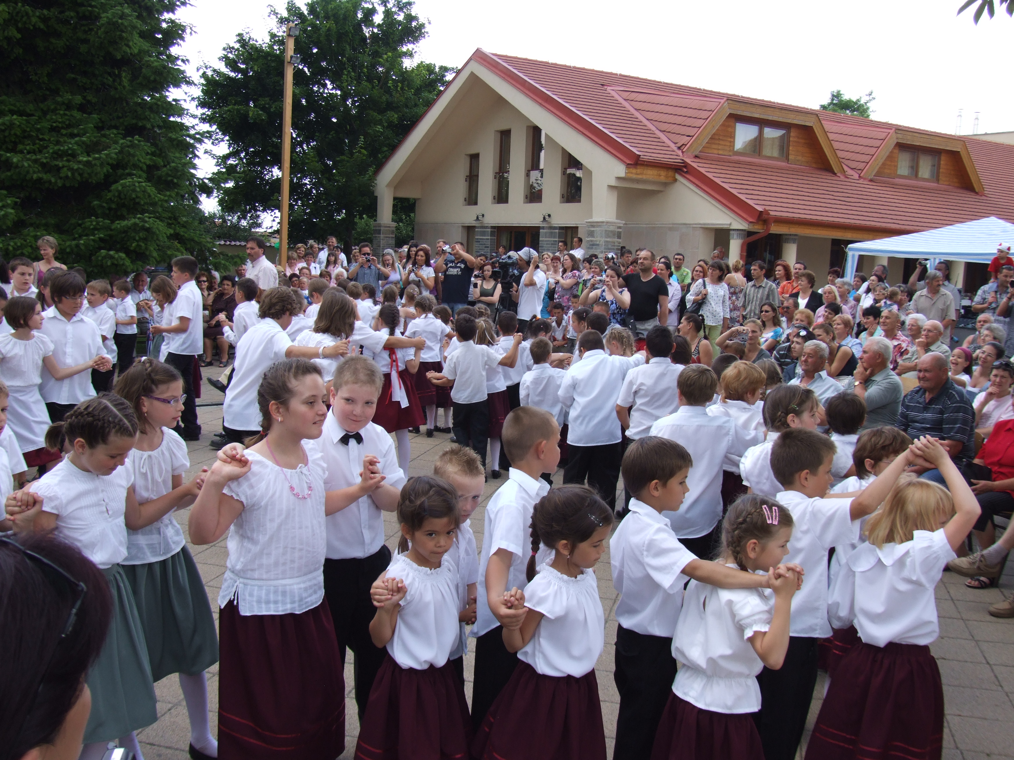 Kindergarten Hartian